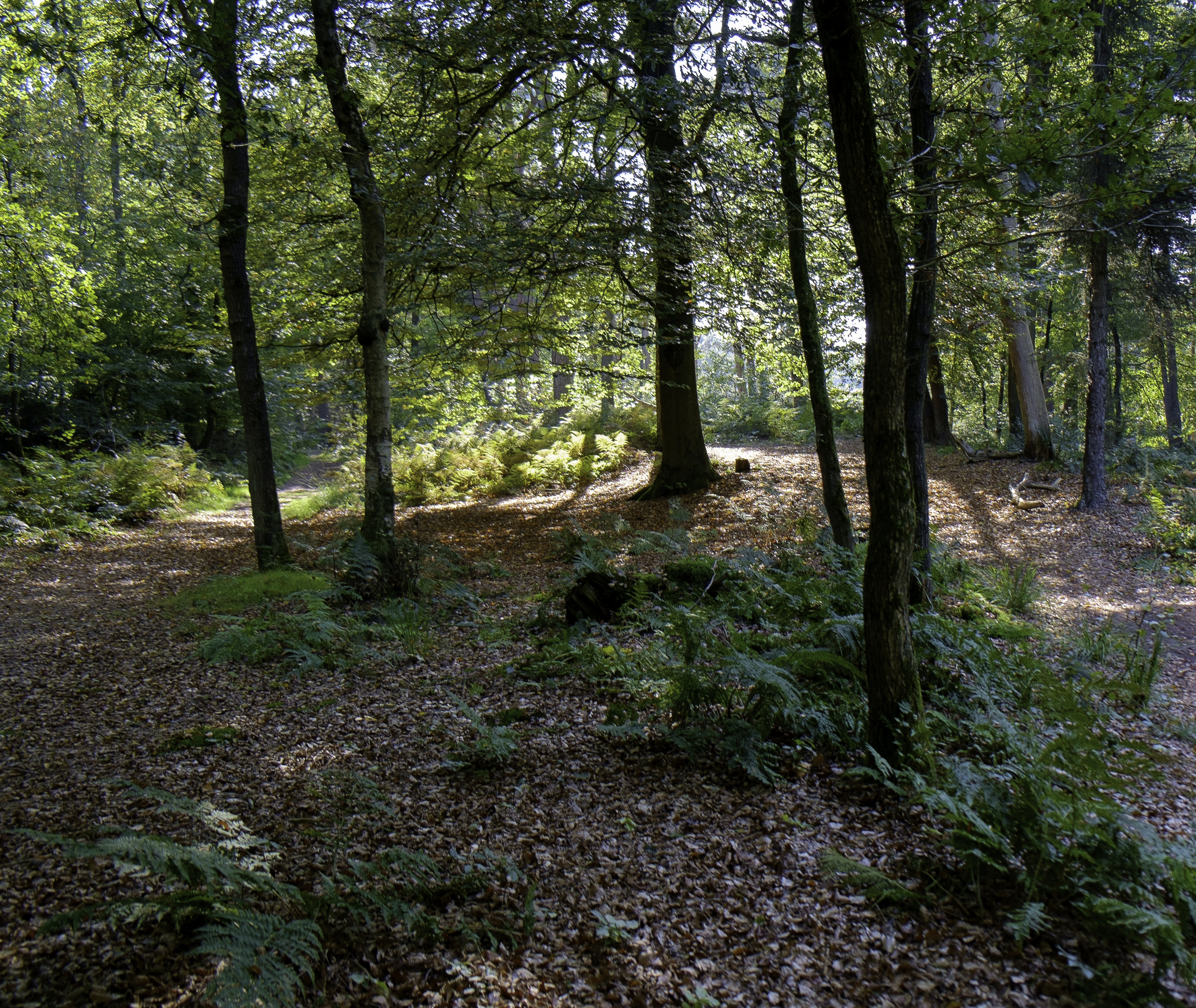 Beuken in het Noordlaarderbos